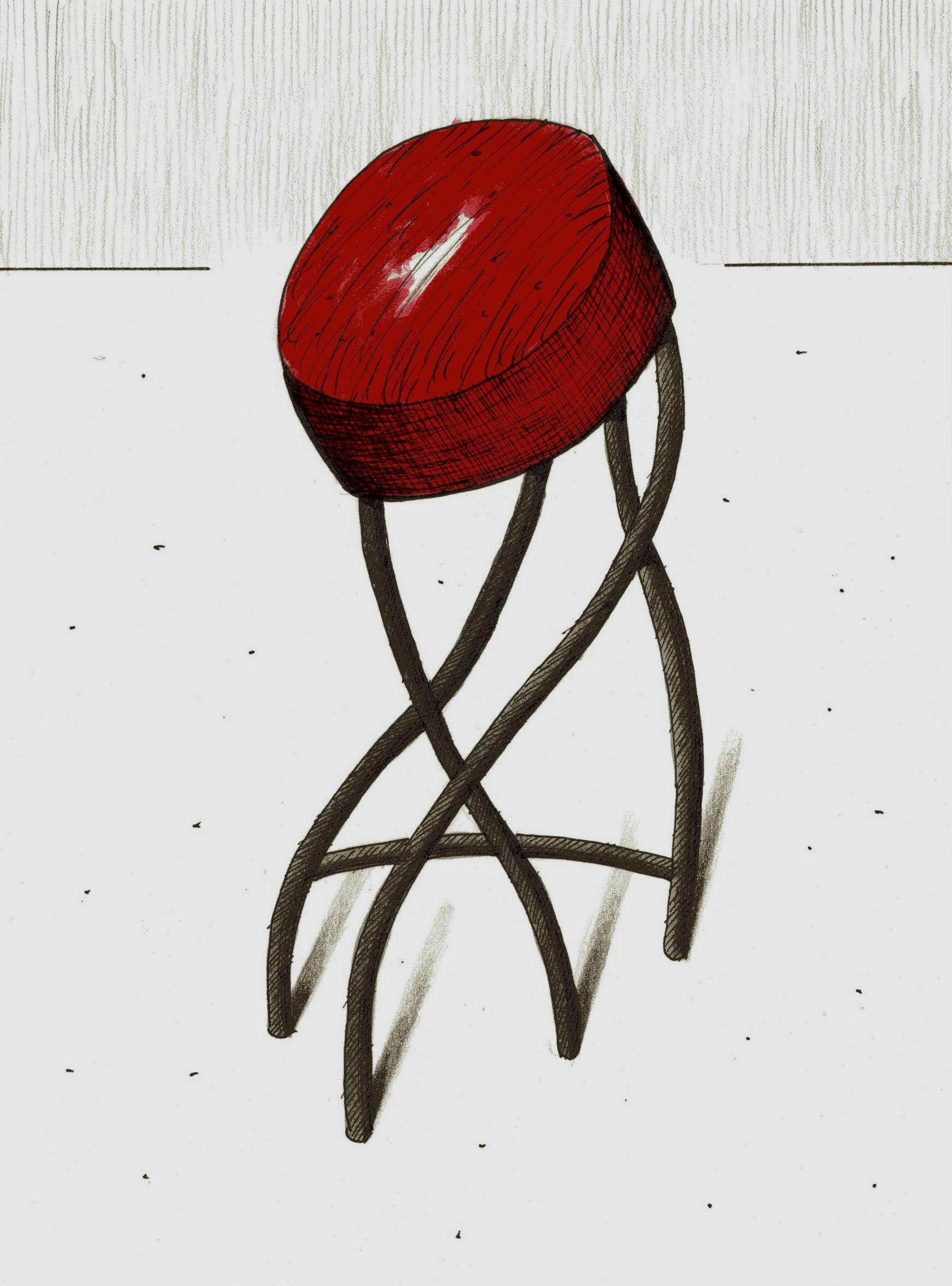 Besoffener Barhocker, 2018, Aquarell, Tusche